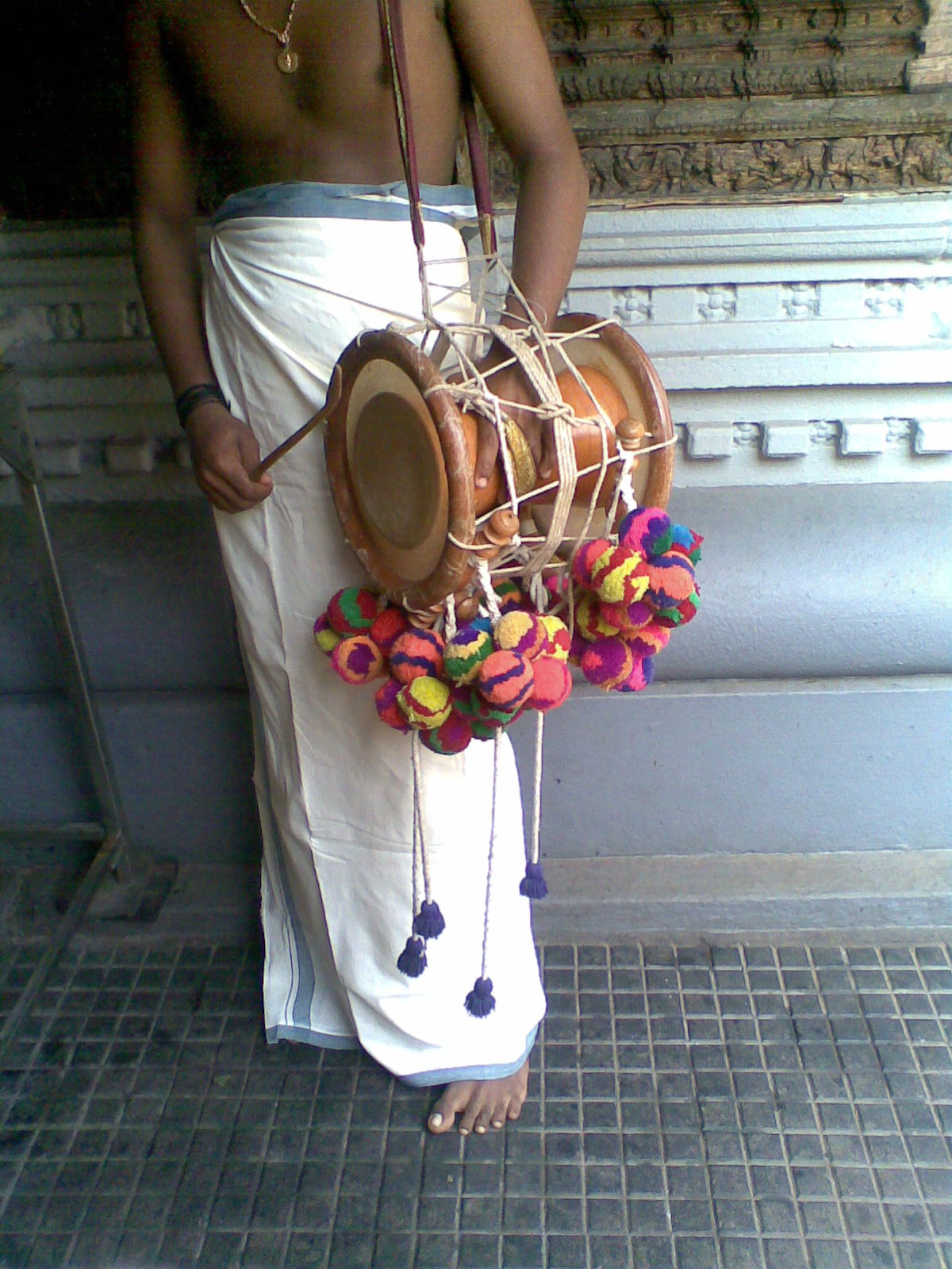 ക്ഷേത്രസോപാനത്തിലെ ഇടയ്ക്കവായന